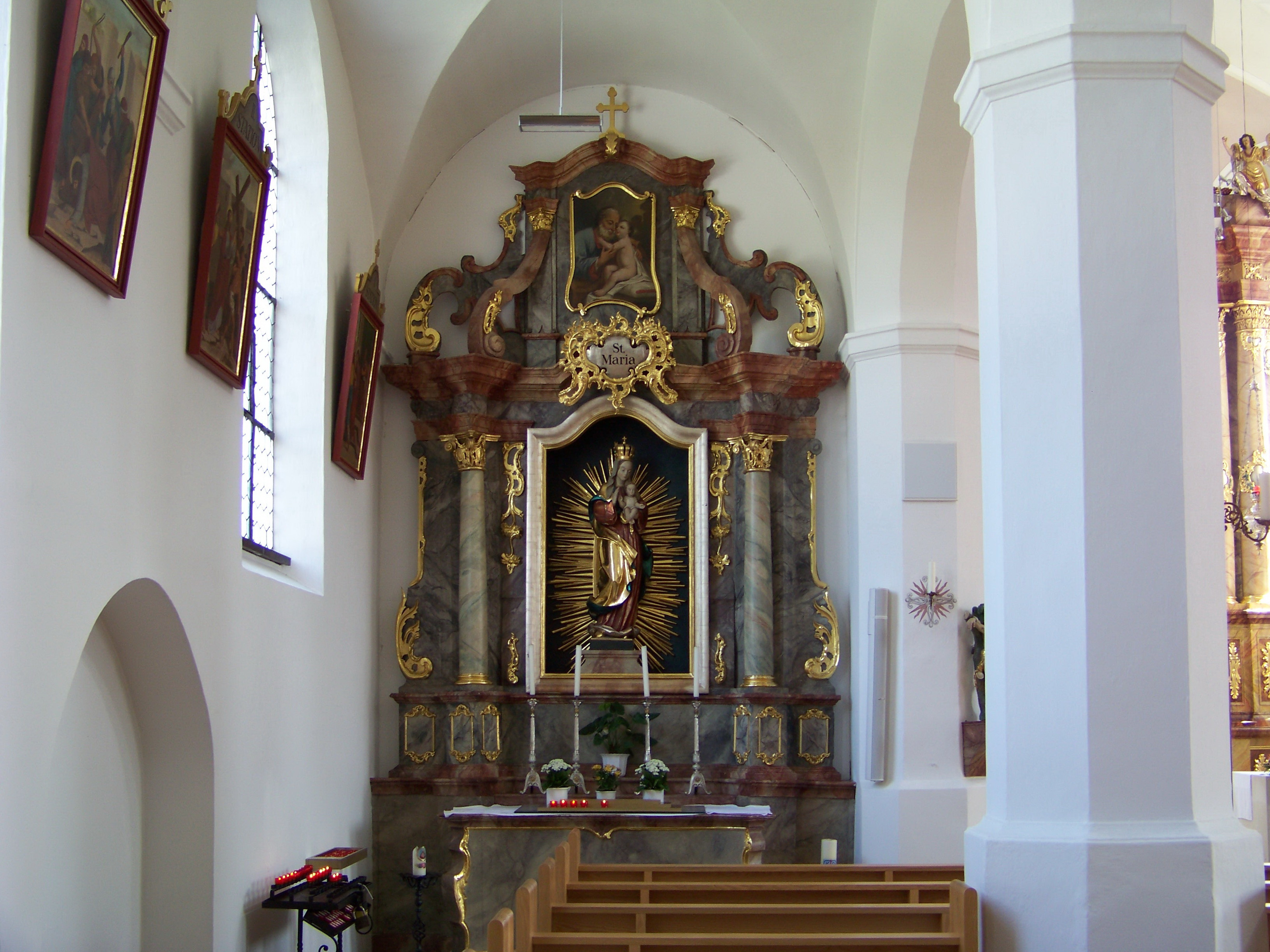 Adlkofen, Hauptstraße 9. Katholische Pfarrkirche St. Thomas. Dreischiffige Basilika. Barocke Anlage mit eingezogenem Chor. Marienaltar im nördlichen Seitenschiff.